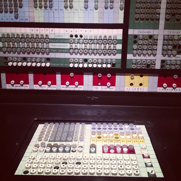 Olivetti Elea 9003 (1959) “Italian computer @louisiana”